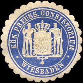 Sealing stamp Title: Königlich Preussische Consistorium - Wiesbaden Description: blau, weiß, geprägt Place: Wiesbaden size: 4 cm